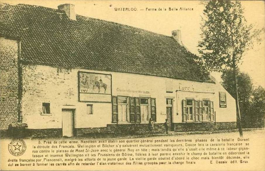 Ferme de Belle Alliance sur le site de la bataille de Waterloo. Ancienen auberge et site touristique. Carte postale début du XXème siècle.